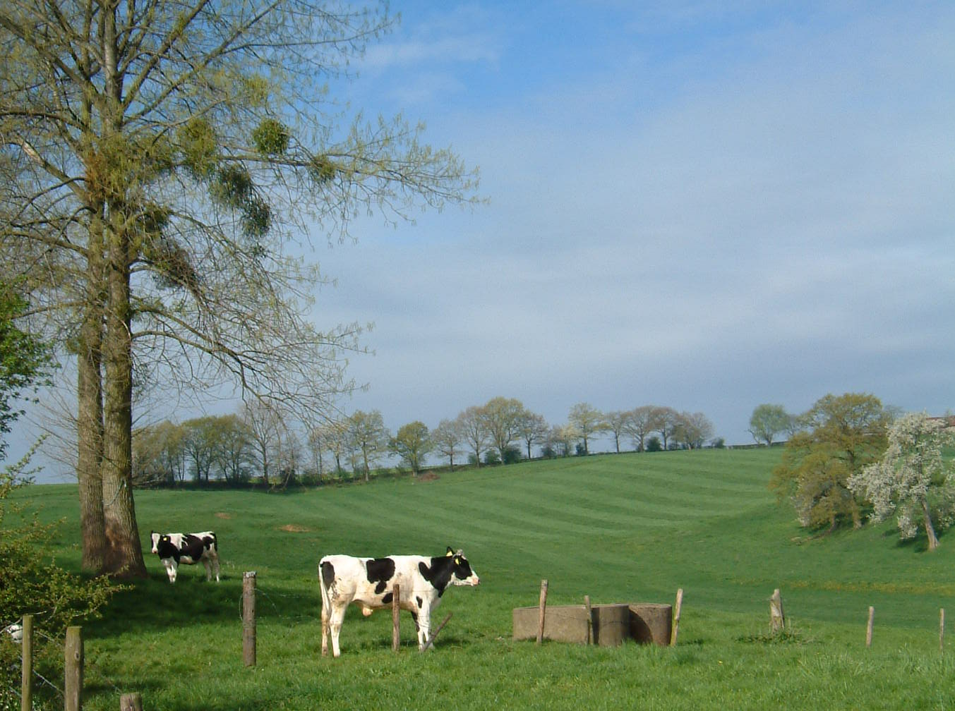 Krijtlandpad